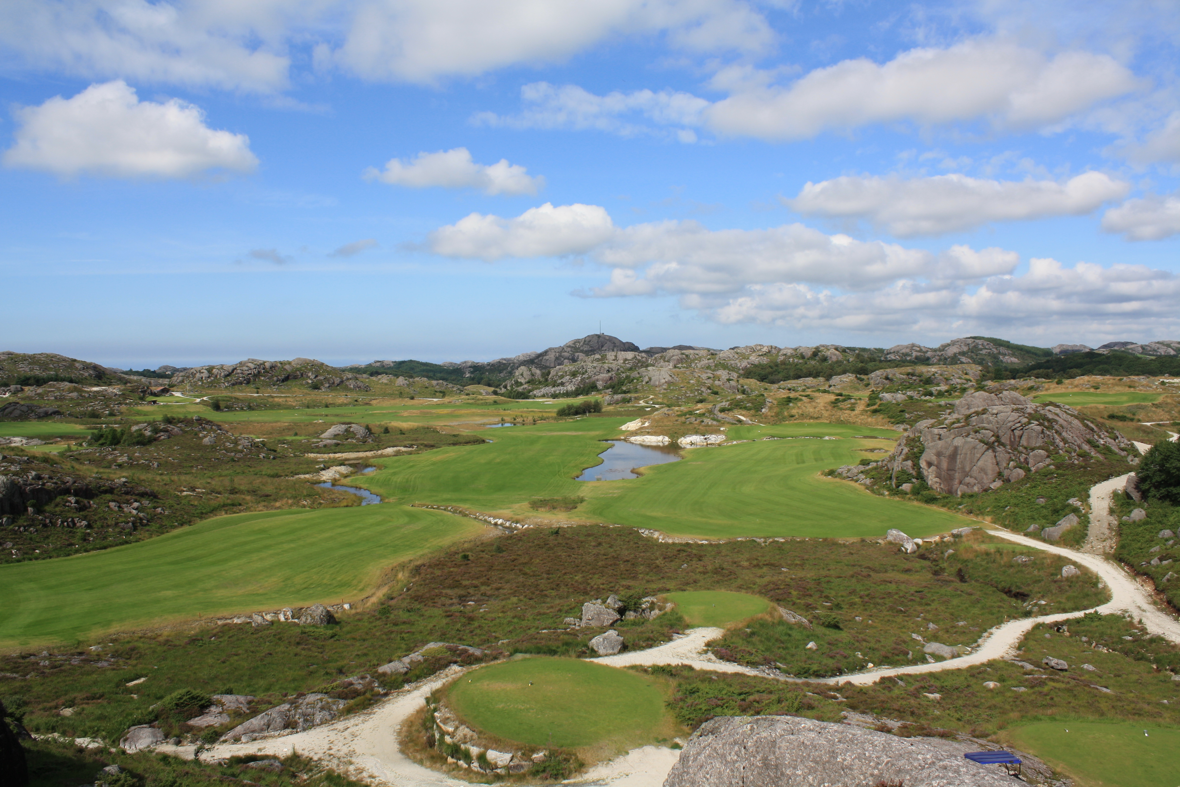 Oversiktsbilde over hull 5 og 7 i Maurholen golfpark